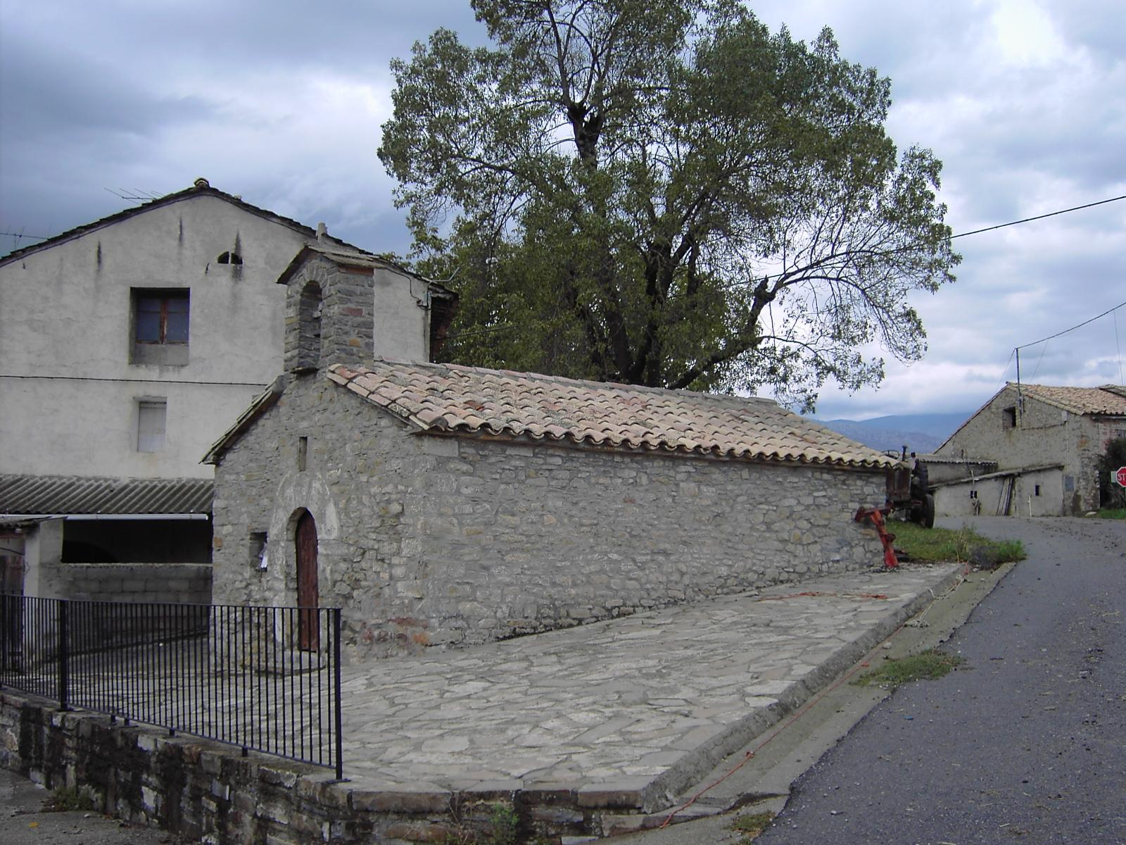 La diminuta capilla de Buetas, en el municipio altoaragonés de La Fueva, muy cerca de Tierrantona